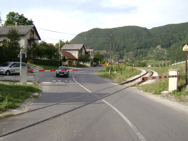 ŽCP između Krapine i Žutnice